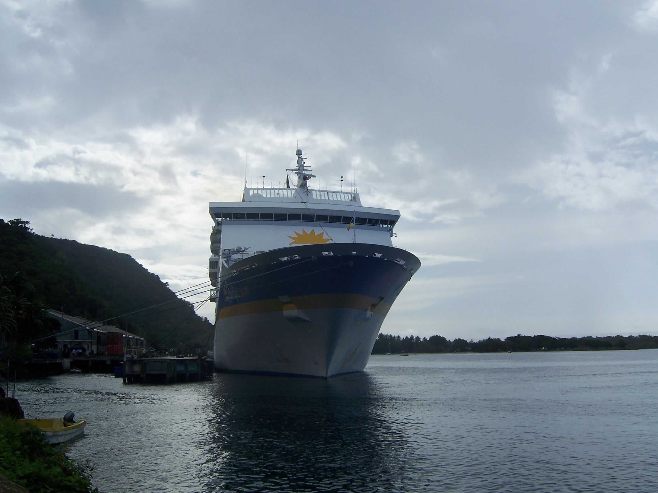 The Pacific Sun alongside, Port Vila, Vanuatu